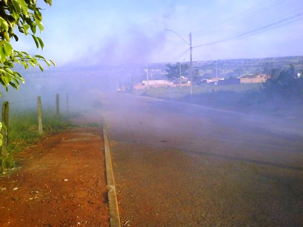 Jardim São José em abril de 2010, região oeste de Goiânia durante época de queimadas.